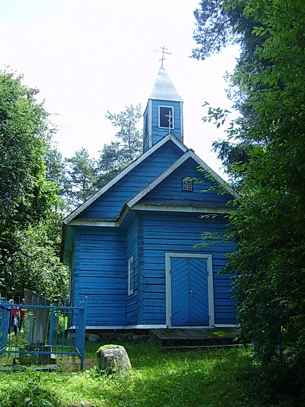 Дзвінаса. Свята-Пакроўская царква